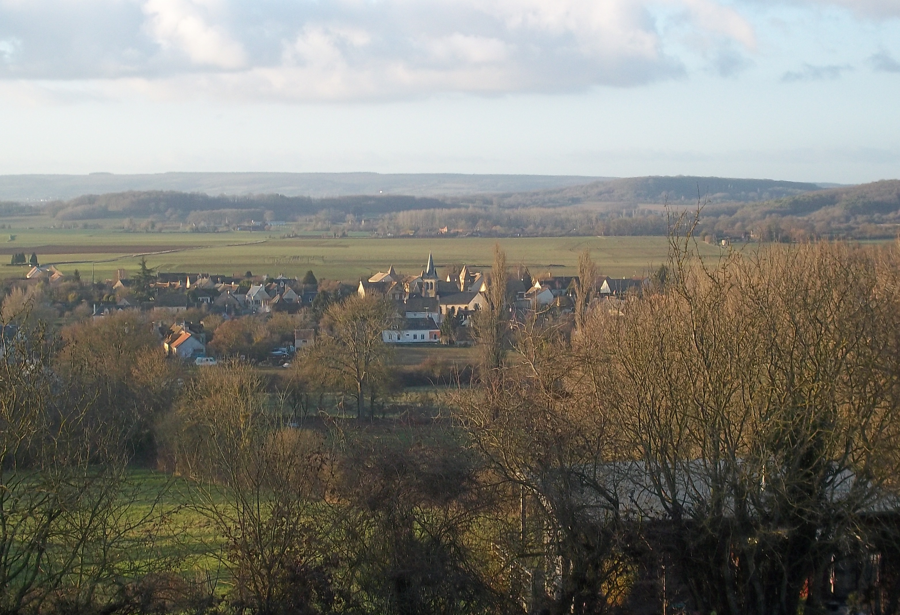 Mézière sous Lavardin - Sarthe - vue générale